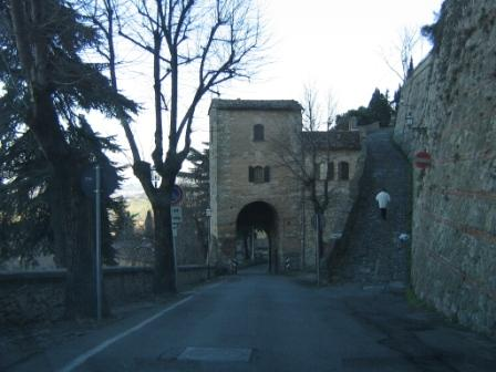 Parte delle mura e porta, Bertinoro (FC), Italy